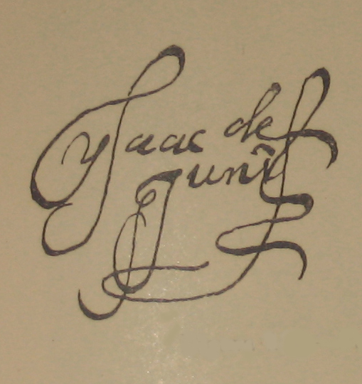 Firma de Isaac de Juni